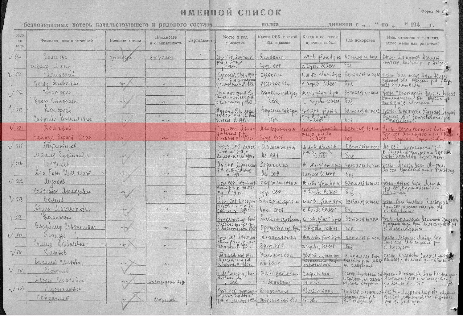 Донесения о безвозвратных потерях упр. ПЭП 106, 20.02.1945. (фрагмент)